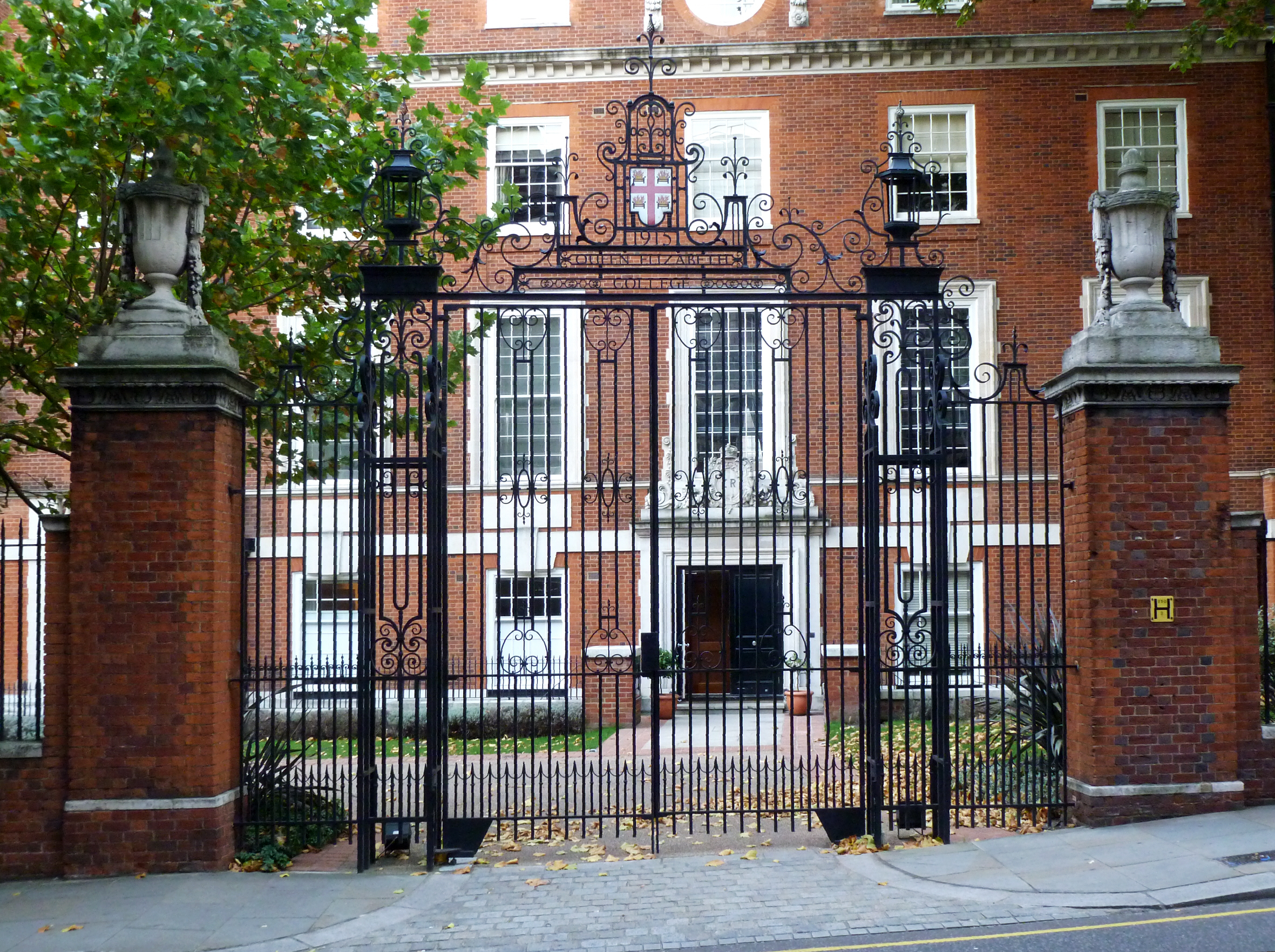 Eingangstor zum Queen Elizabeth College, Teil des King's College London. Der Kopf des Tores zeigt als Gründungsjahr des Queen Elizabeth College an der Campden Hill Road, Kensington, das Jahr 1915.